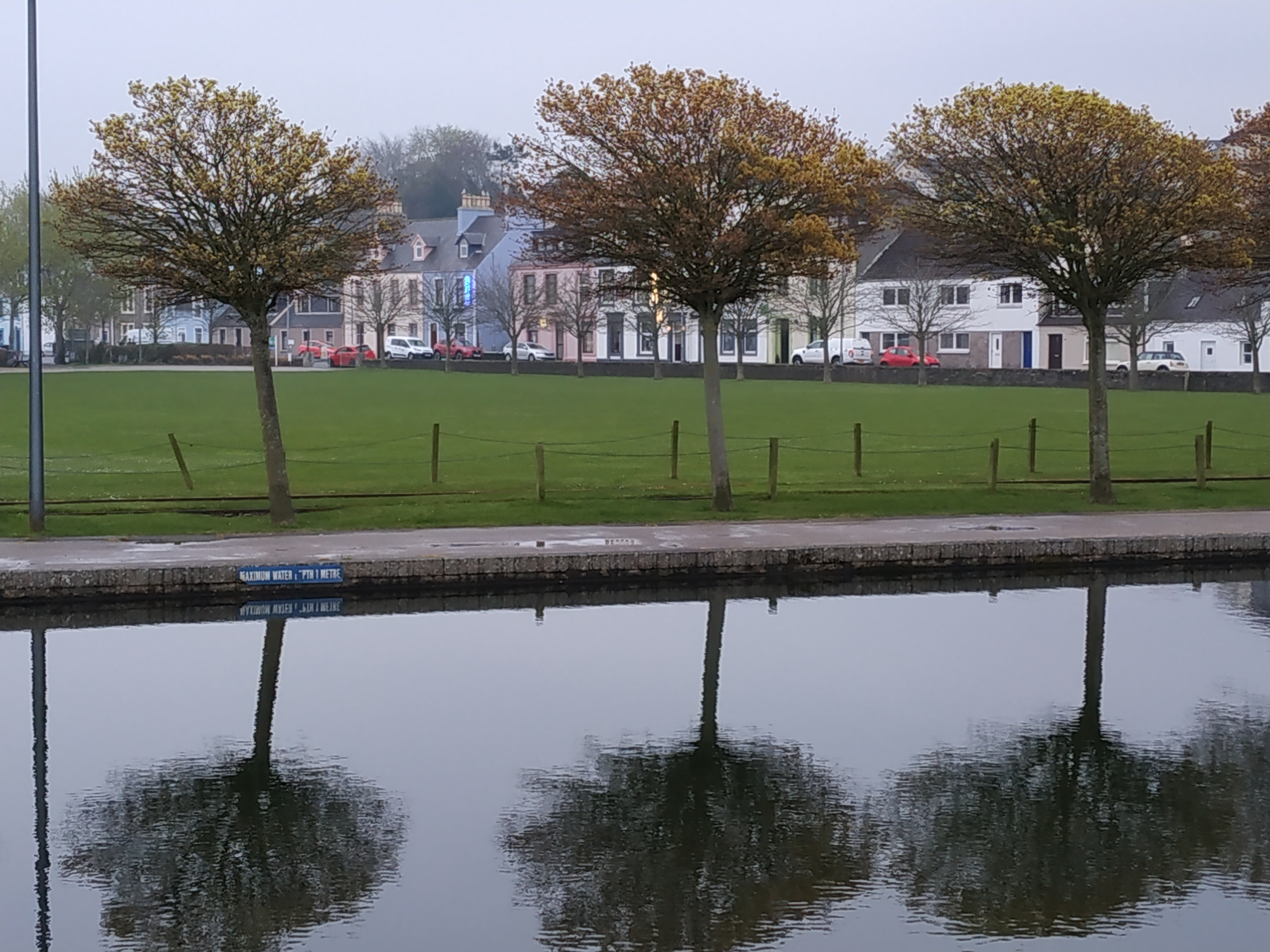 This park is between the road and the beach. There is a playground, a lake and a green area.